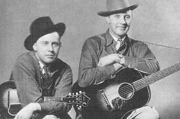 Die Monroe Brothers Mitte der dreißiger Jahre